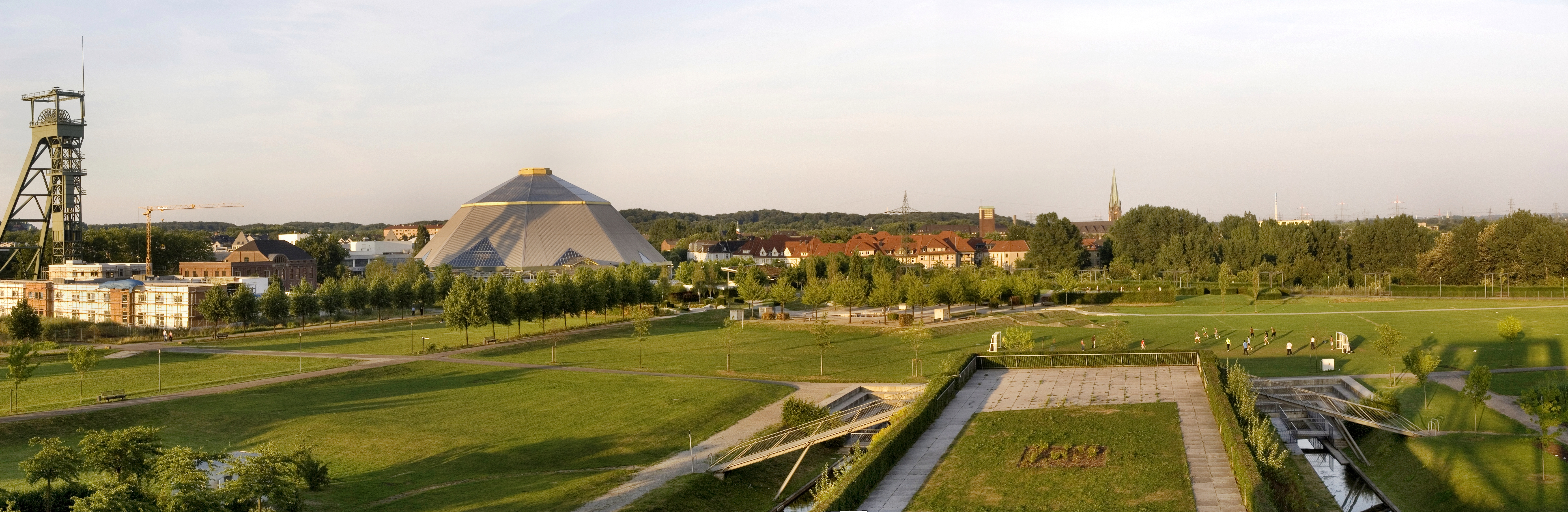 NRW, Оберхаузен, панорама OLGA-park'а